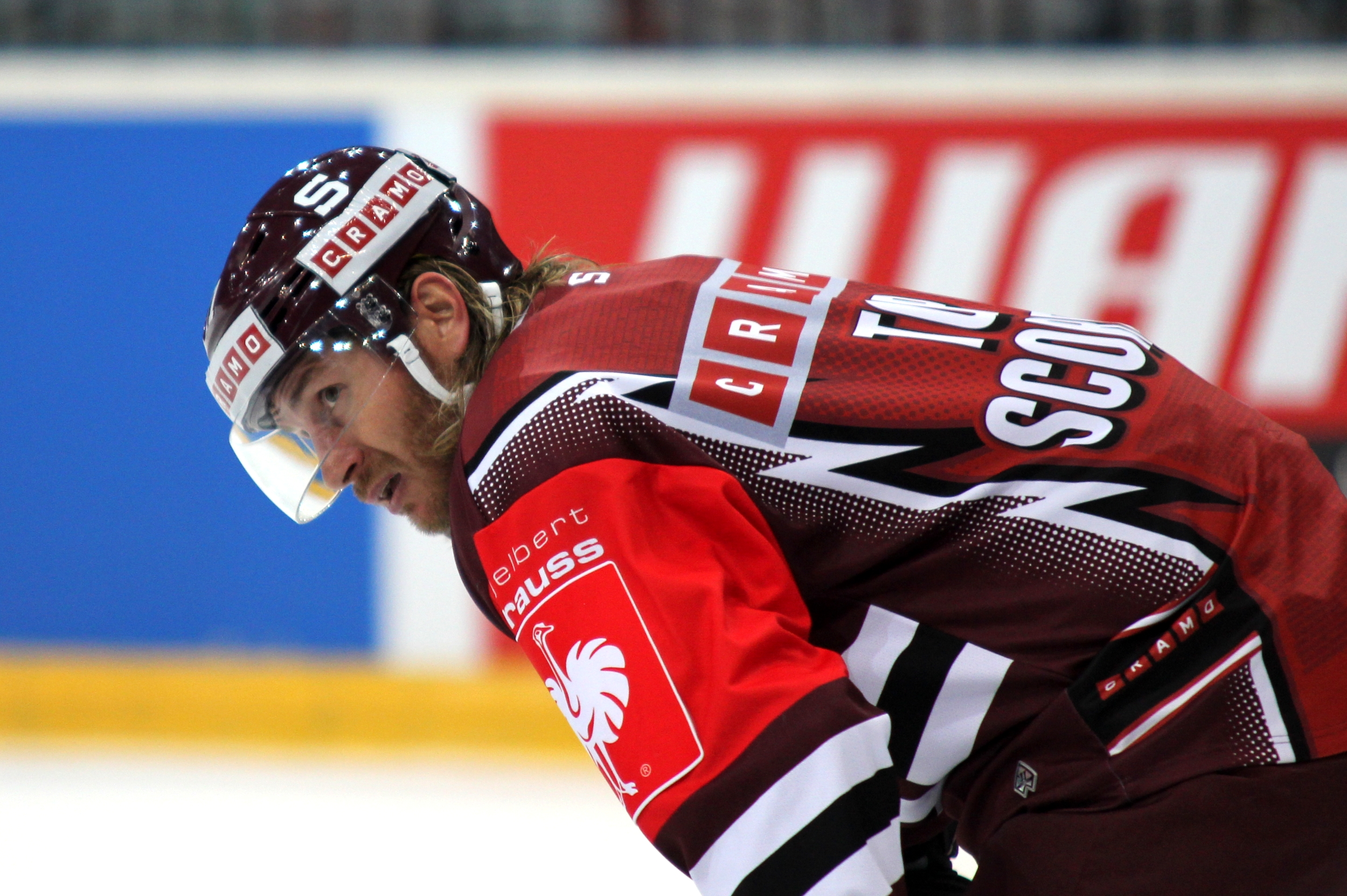 Tomáš Netík (P 71, CTS).